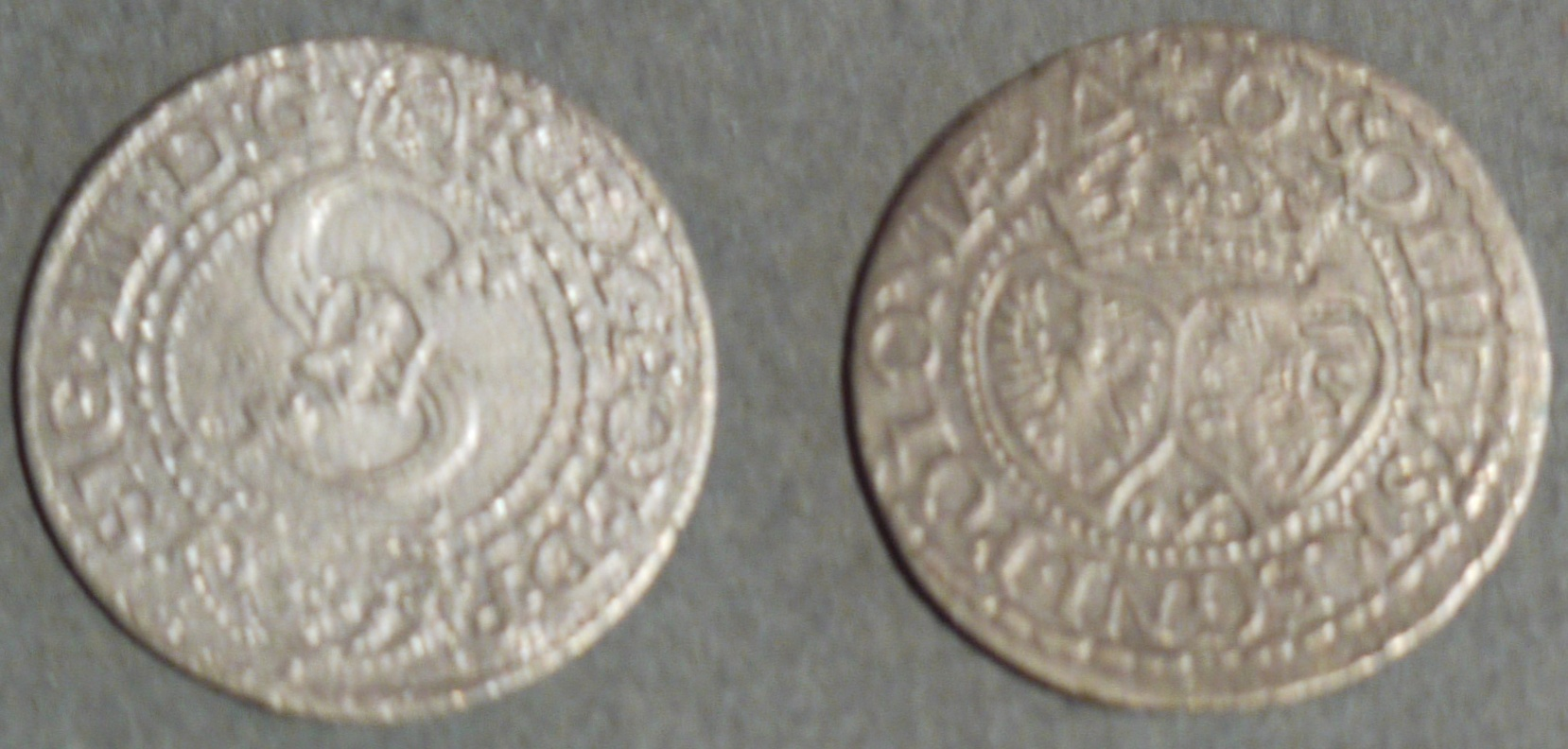 Szelągi z czasów Zygmunta III Wazy, rok 1592, ze zbiorów gabinetu numizmatycznego w Malborku.